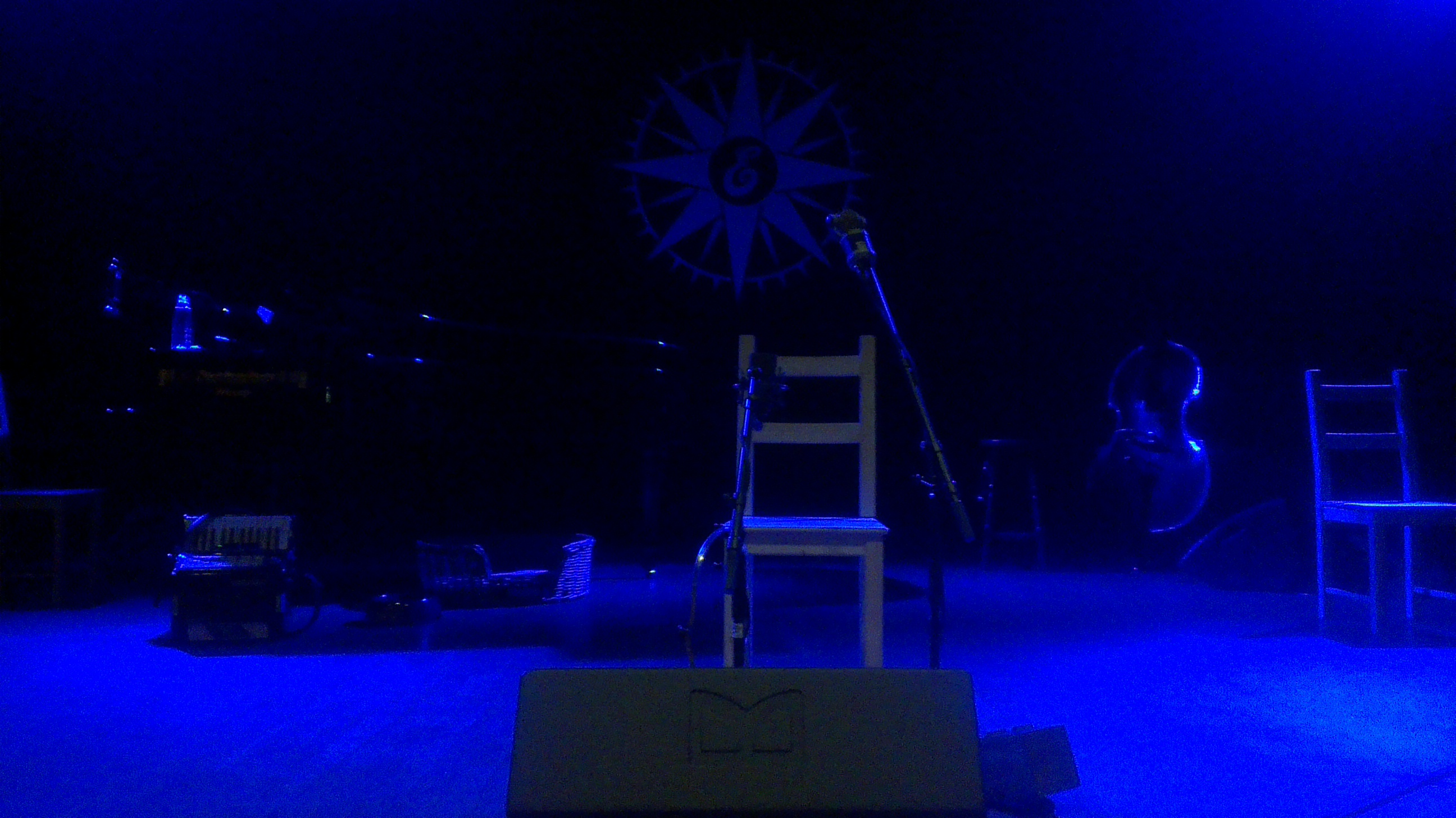 Het podium vlak voor het begin van de voorstelling Ericana van Daniël Lohues in Dorpshuis Heerde op vrijdag 16-02-2013.